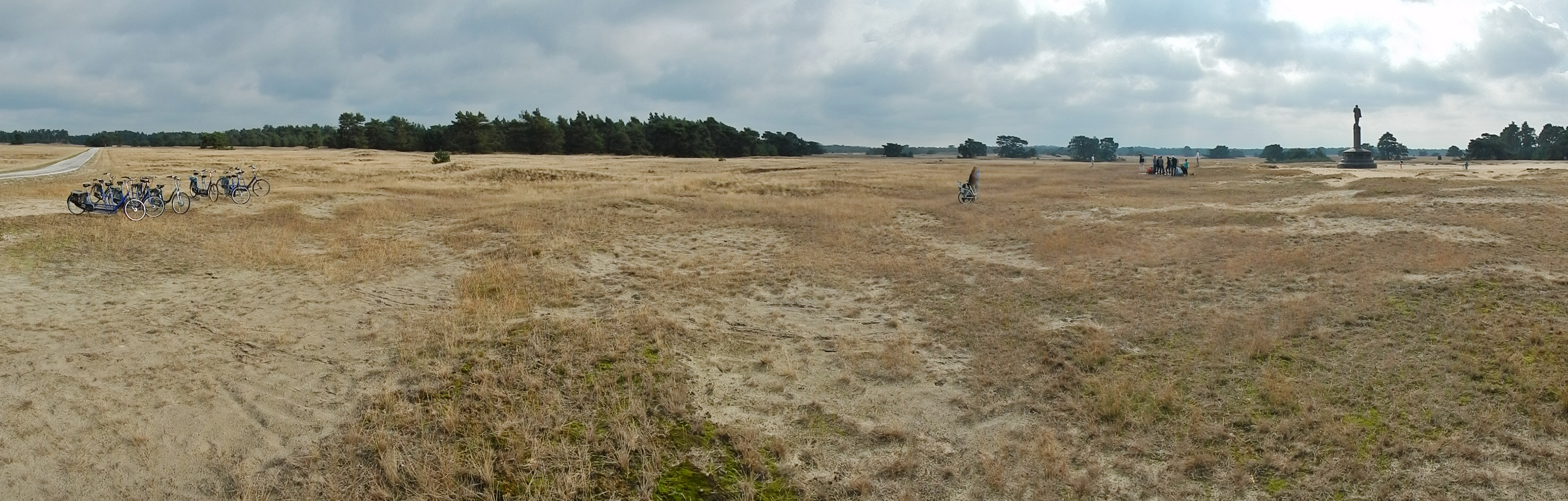 Standbeeld Gen de Wet im Hoge Veluwe National Park, Otterlo